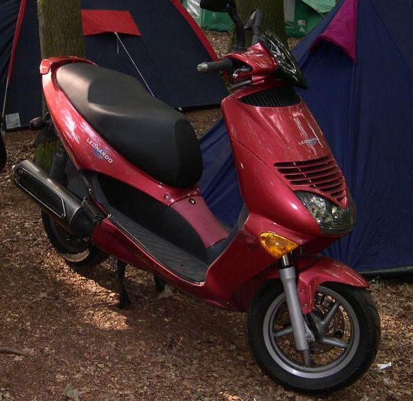 Aprilia_Leonardo_scooter_weertfm.JPG (69KB, MIME type: image/jpeg) Toestemming van WeertFM